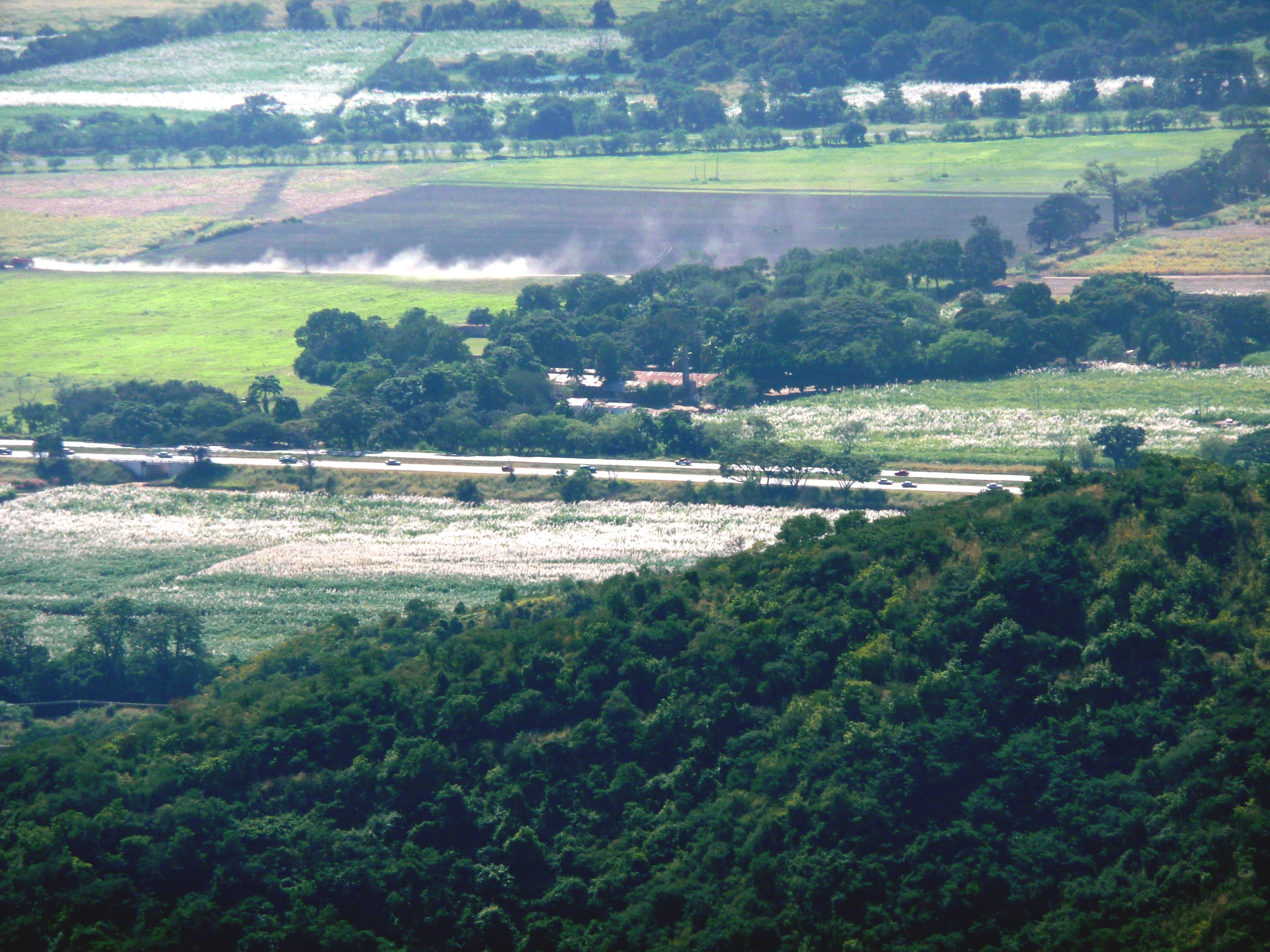 Lugar / Place / Lieu : Near Turmero, Aragua, Venezuela.